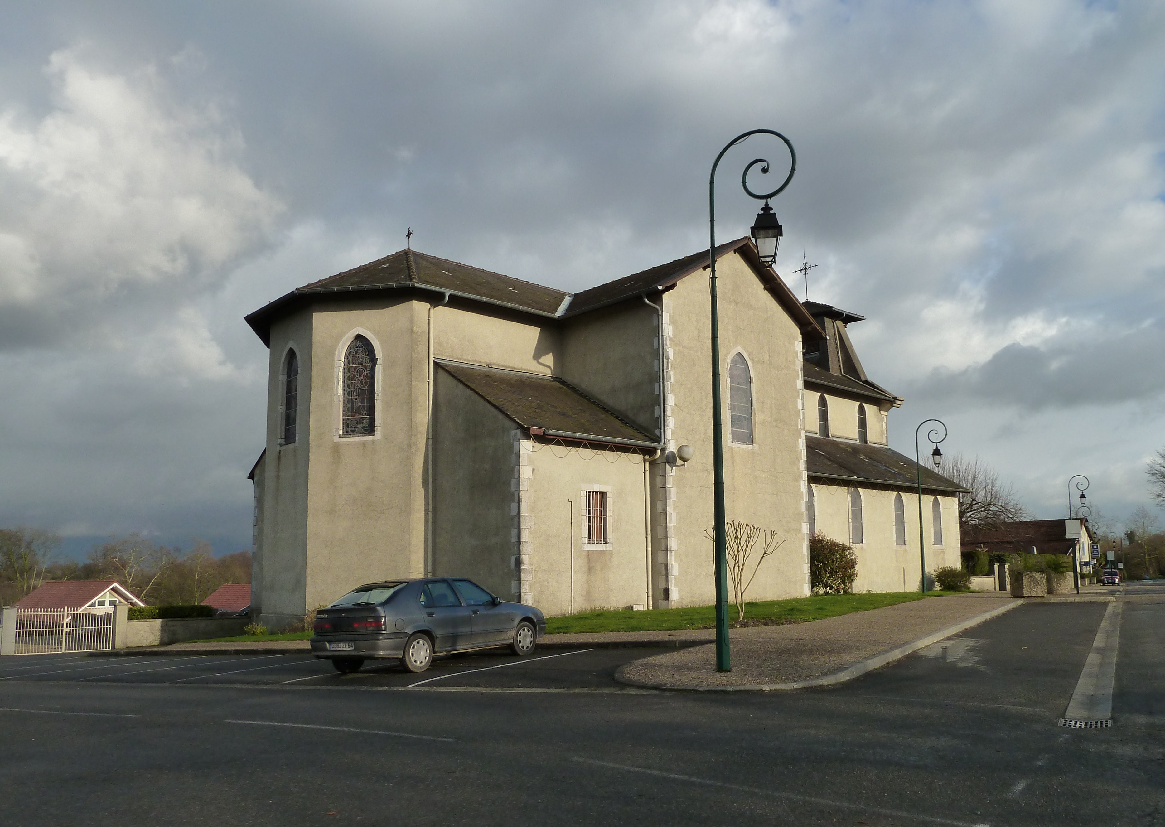 Eglise de Saint-Castin.